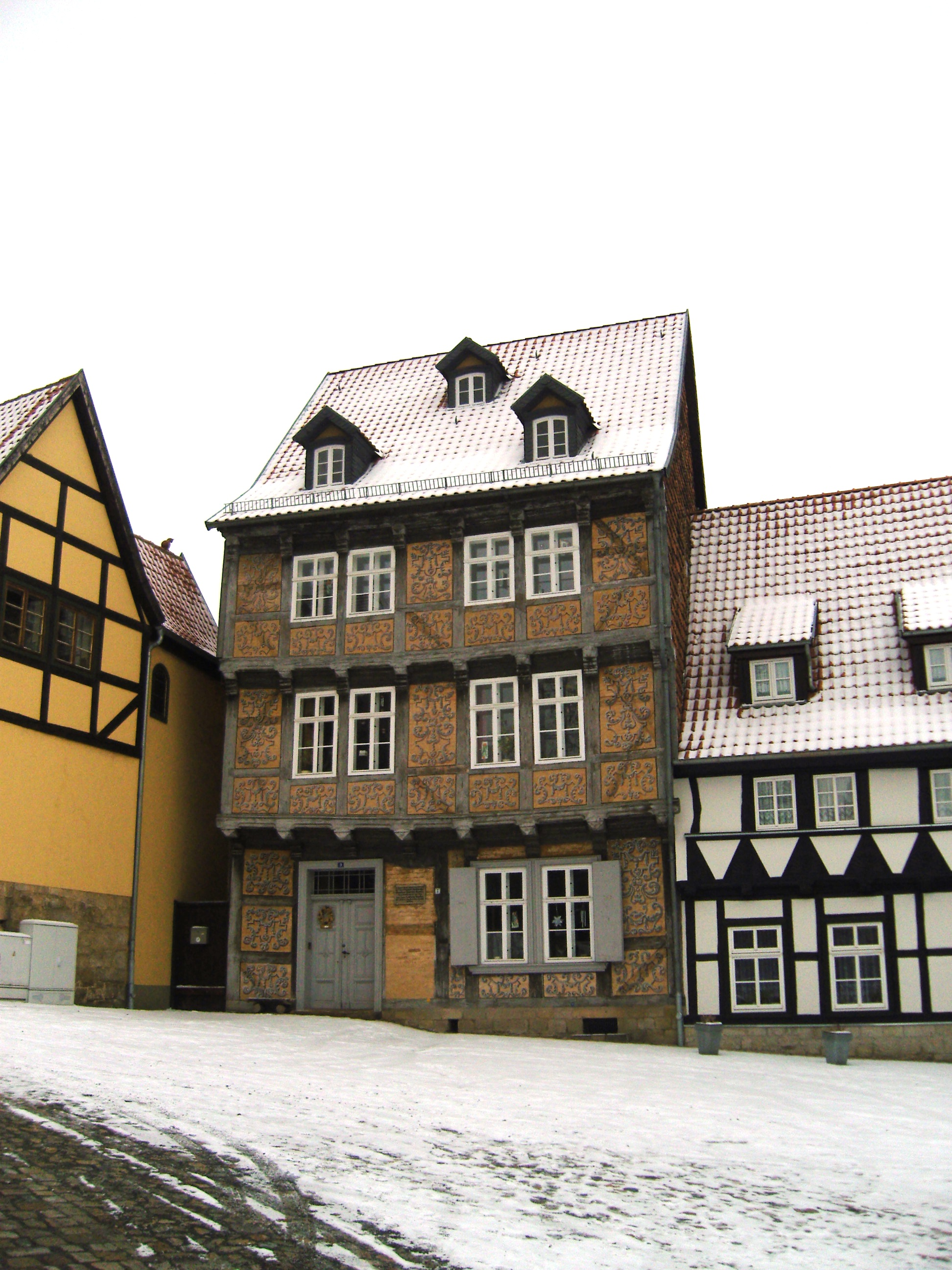 Denkmalgeschütztes Wohnhaus Schloßberg 9 in Quedlinburg